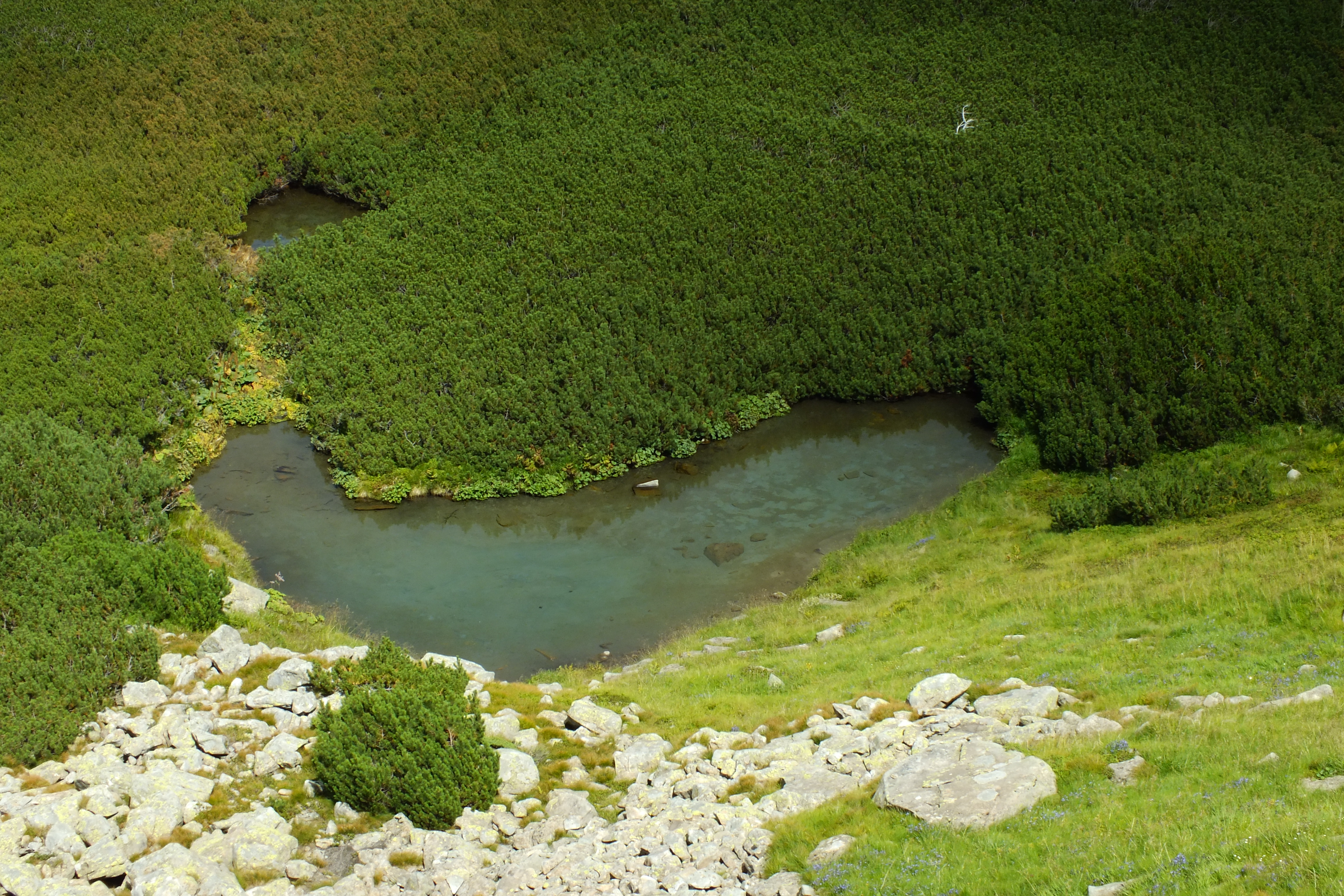 Озерце Холодне - загальний вигляд зверху. Має підземне живлення у вигляді джерельця з південно-захіного берегу.